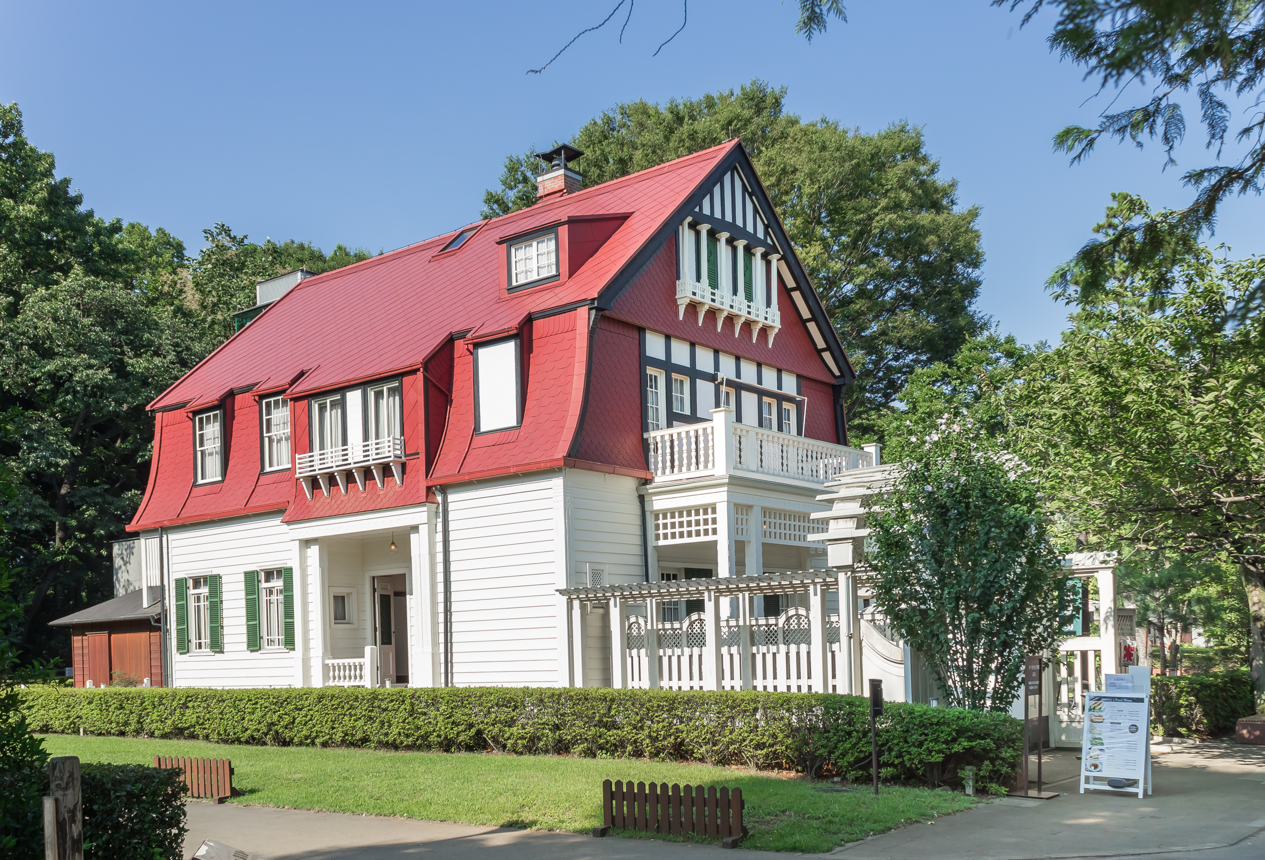 デ・ラランデ邸（江戸東京たてもの園）